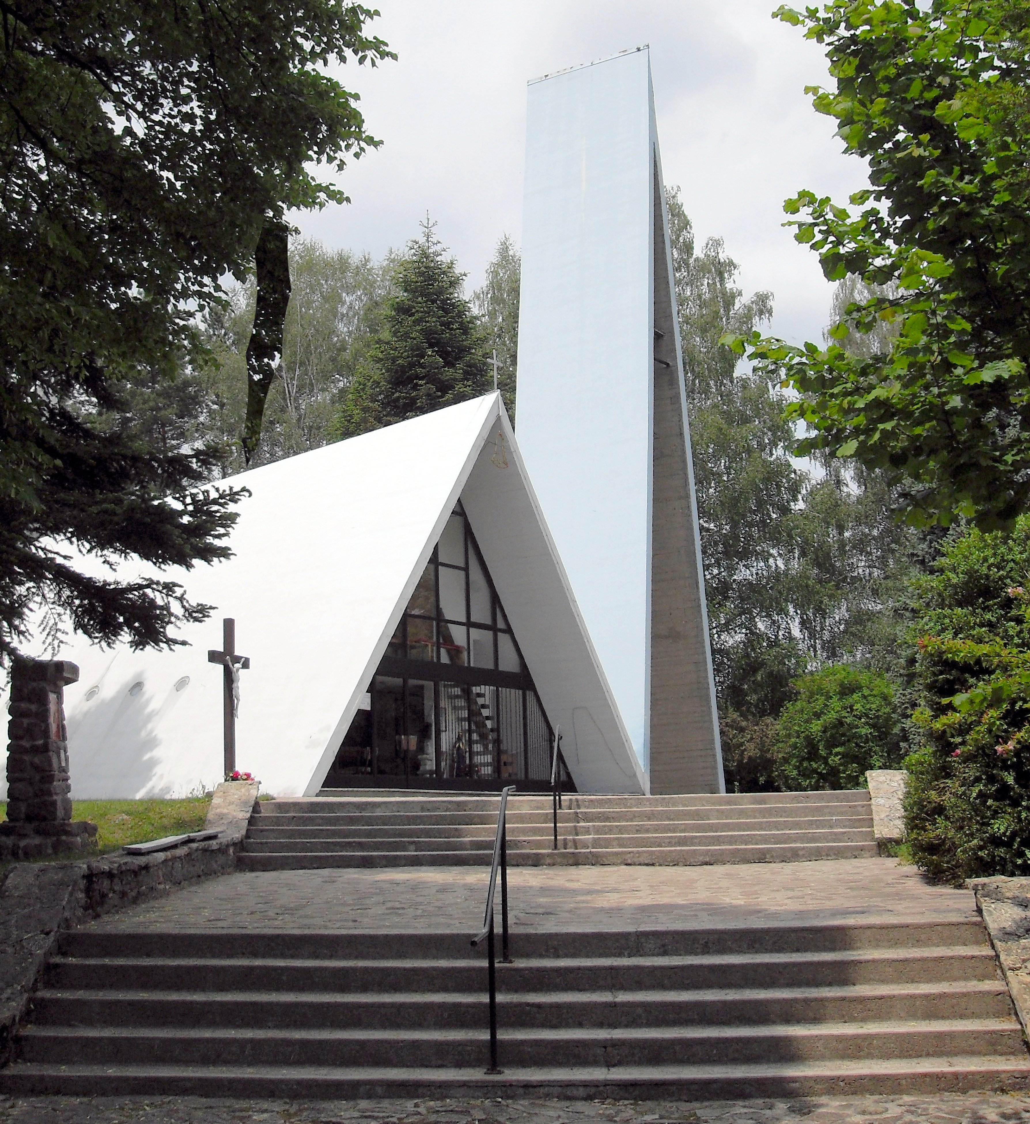 Szent László Római katolikus templom Hollóháza